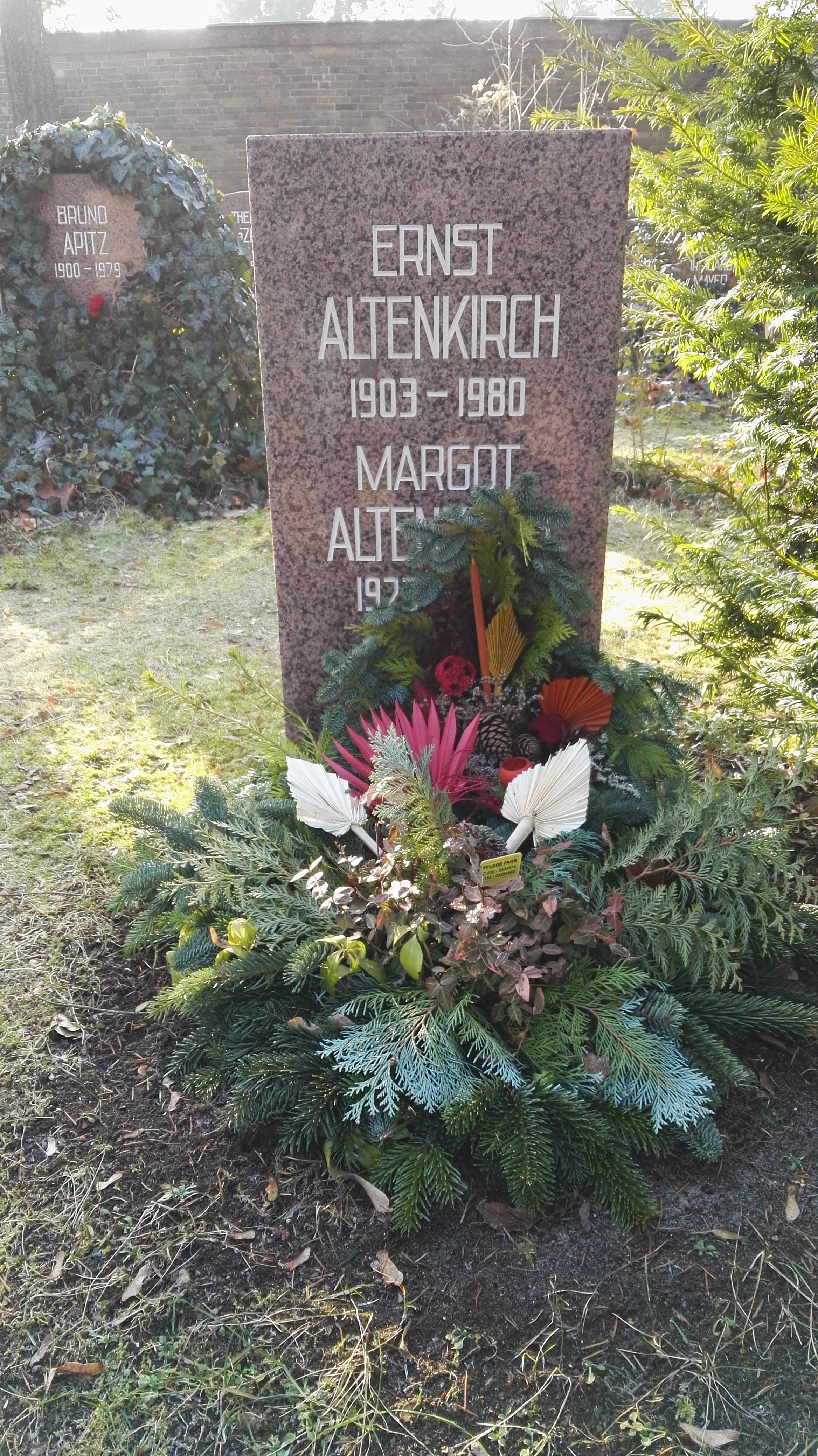 Grab von Ernst Albert Altenkirch und Margot Altenkirch in der Grabanlage Pergolenweg auf dem Sozialistenfriedhof des Zentralfriedhofs Friedrichsfelde